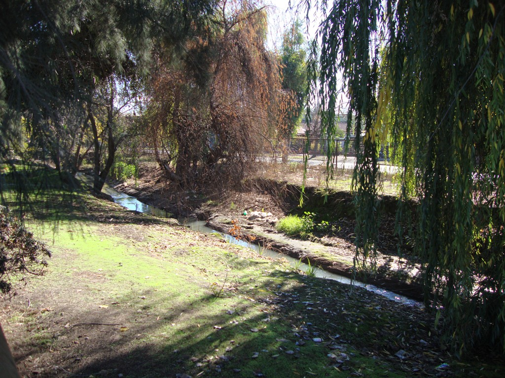 Imagen del canal Ortuzano en Cerrillos, Chile